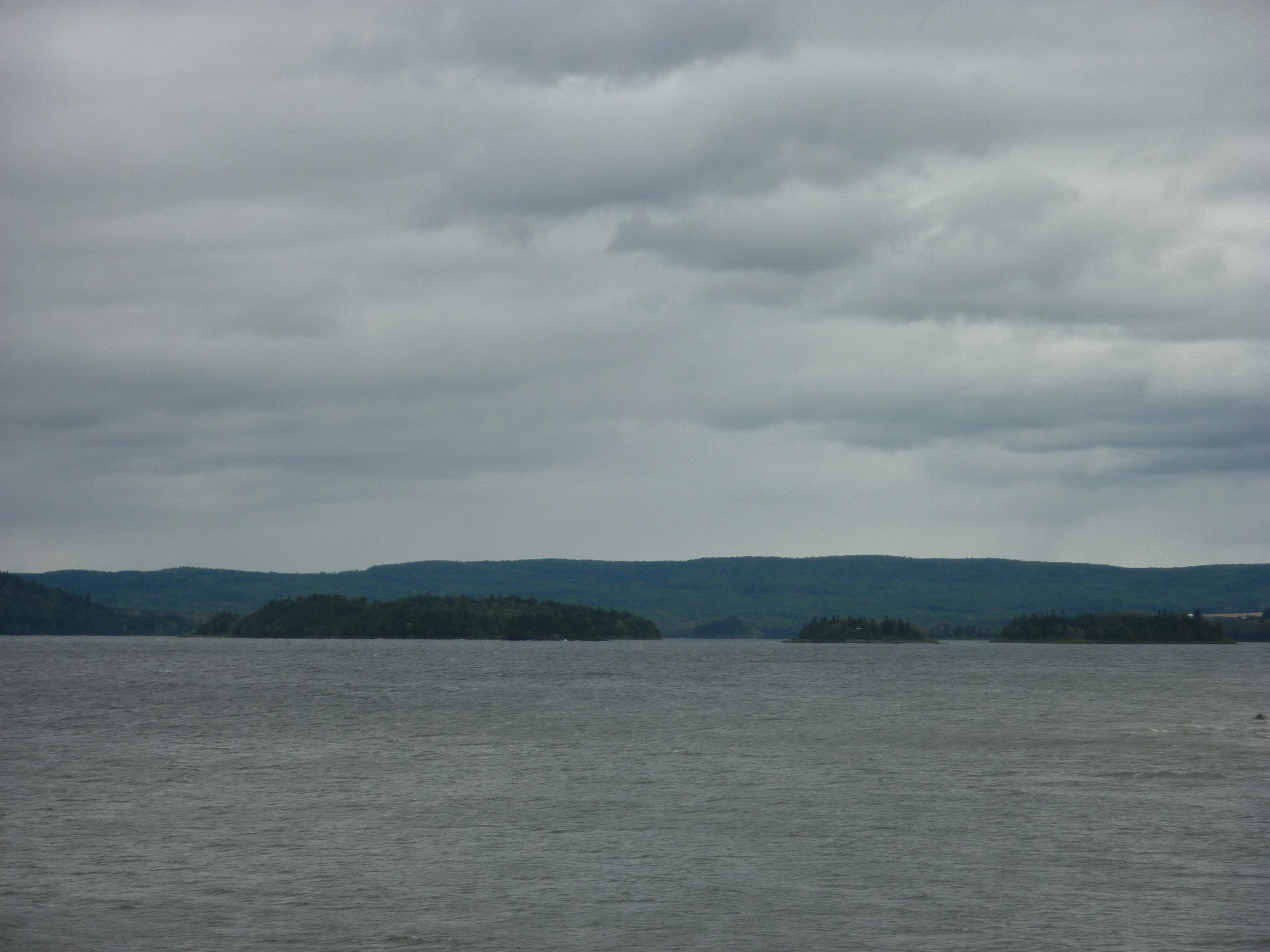 Îles du lac Matapédia vues à partir du belvédère de Val-Brillant